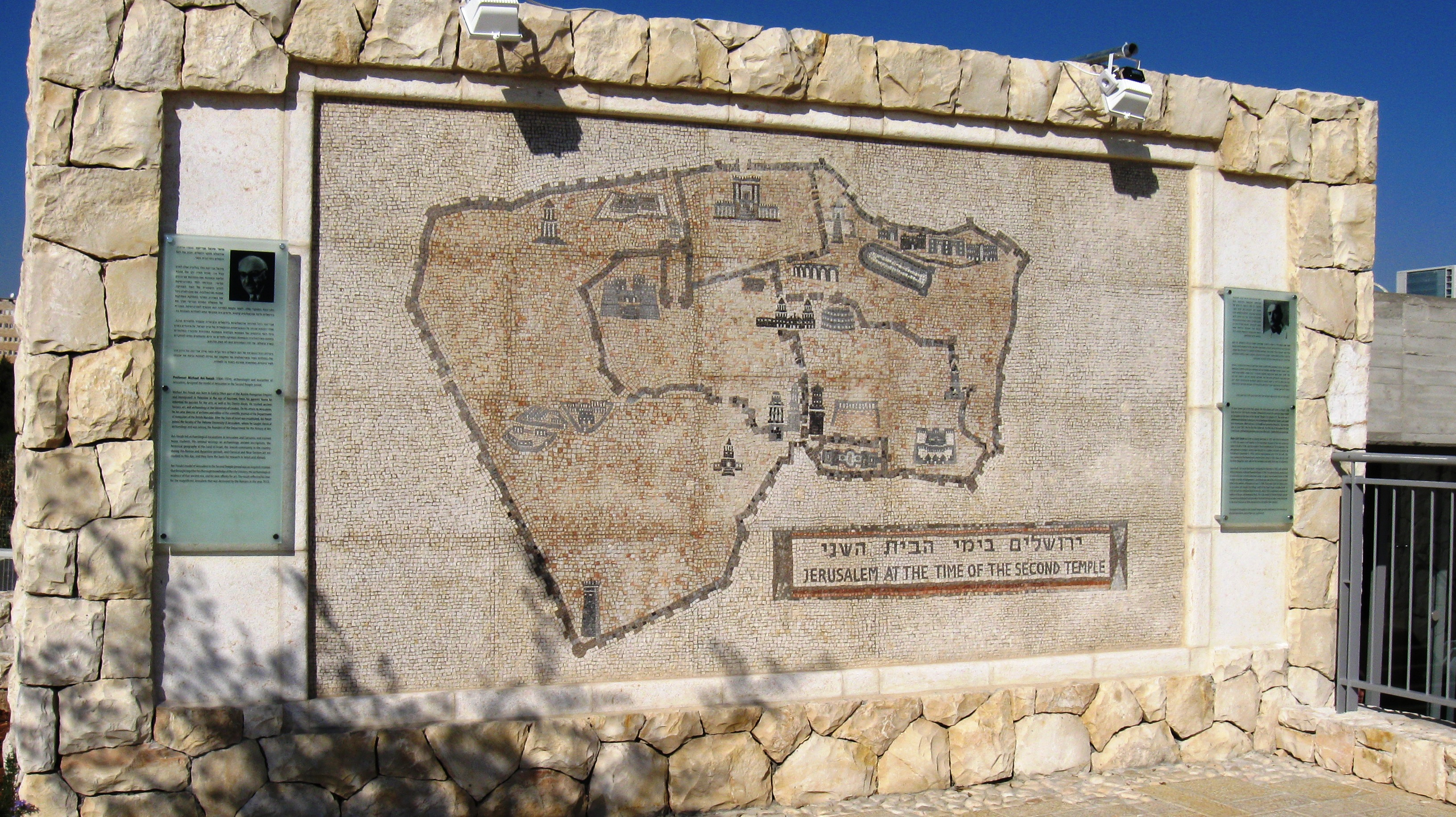 מפת המודל במוזיאון ישראל רישיון נוצר על ידי משתמש:Daniel Ventura